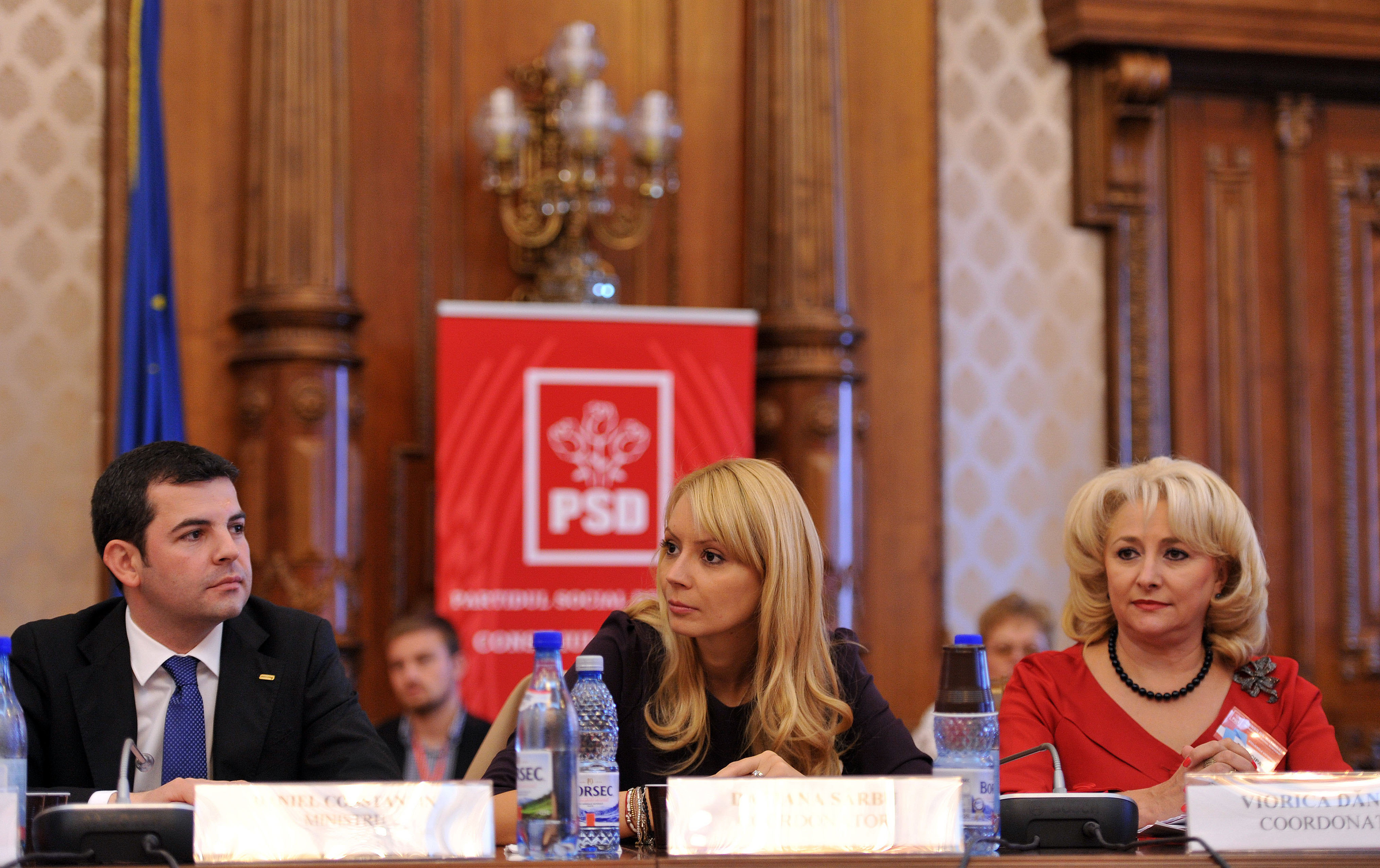 Daciana Sarbu si Viorica Dancila la Atelierele Viitorului - Editia a III-a, Palatul Parlamentului